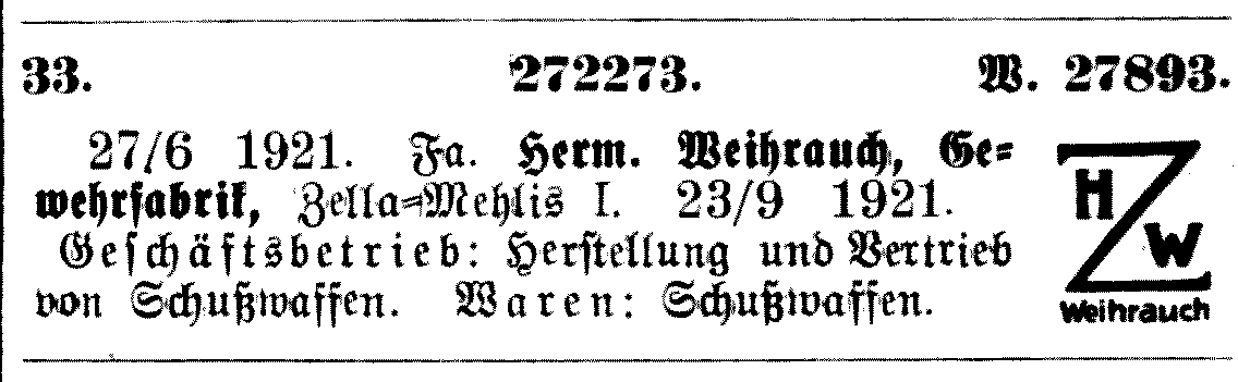 Warenzeichen Weihrauch 1921, Deutscher Reichsanzeiger 1921/238 Seite 14 Lfd.-Nr 33/272273 Warenzeichennummer 27893